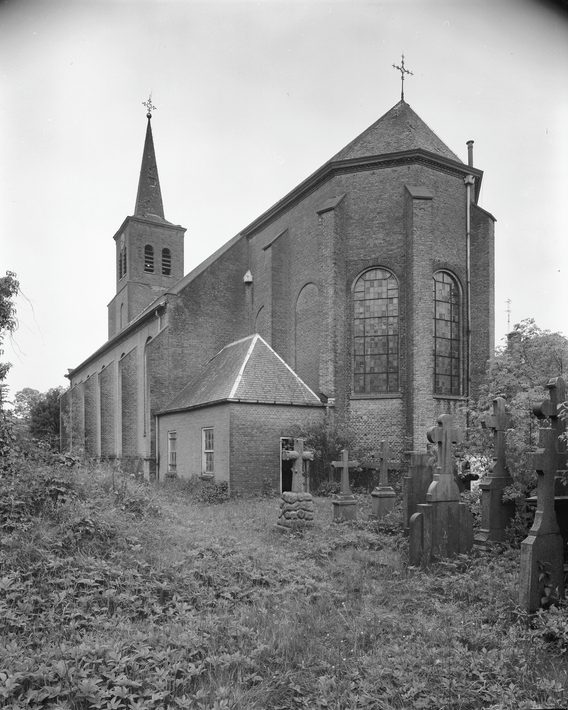 Rooms-Katholieke Kerk: exterieur naar het noord-westen